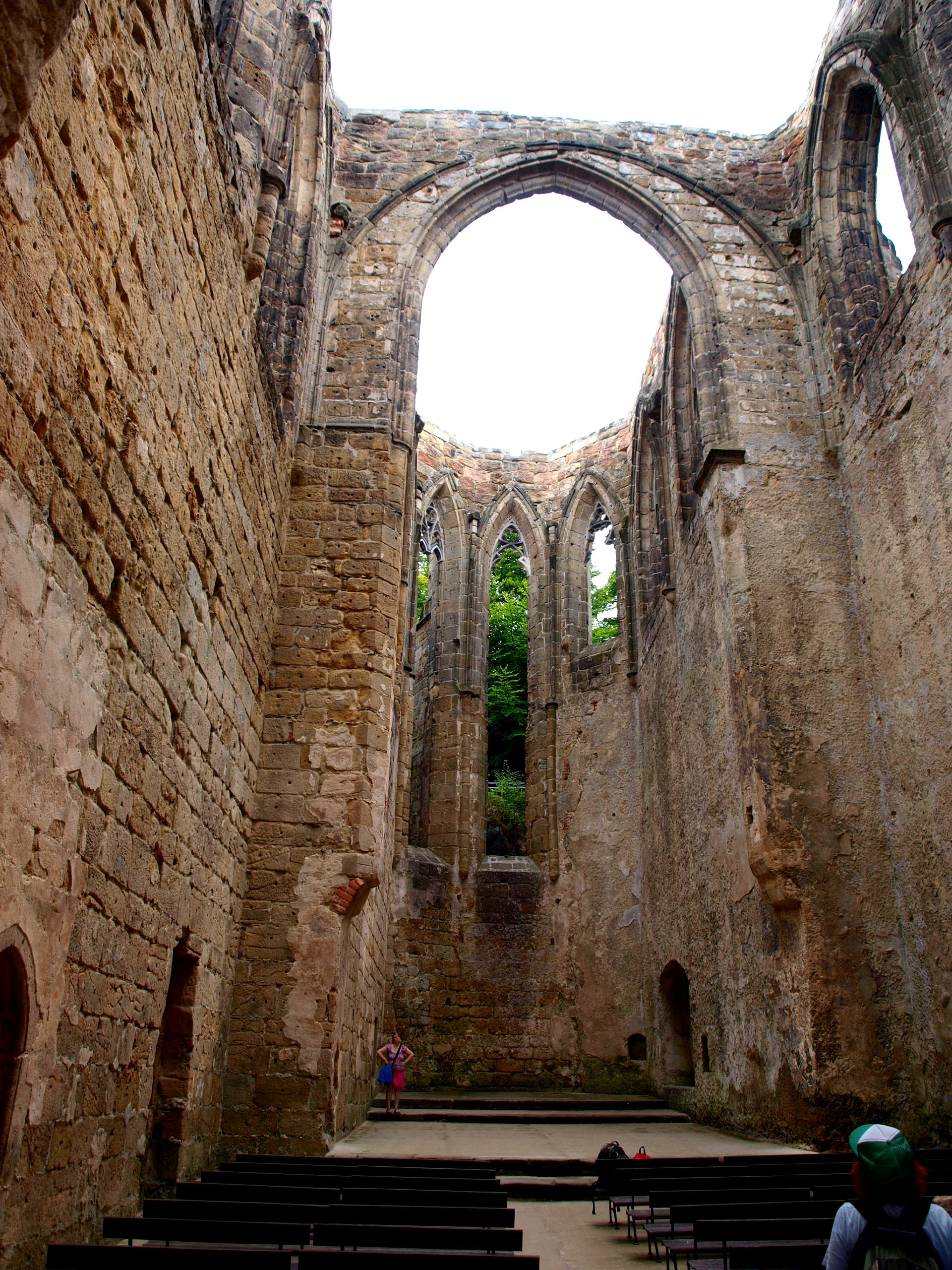 Česky: Hrad Ojvín (kostel)